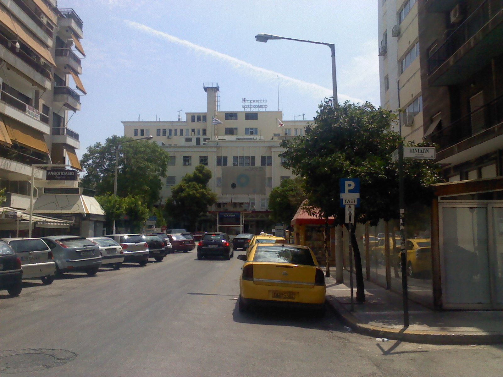 Tzanneio Hospital Pireas